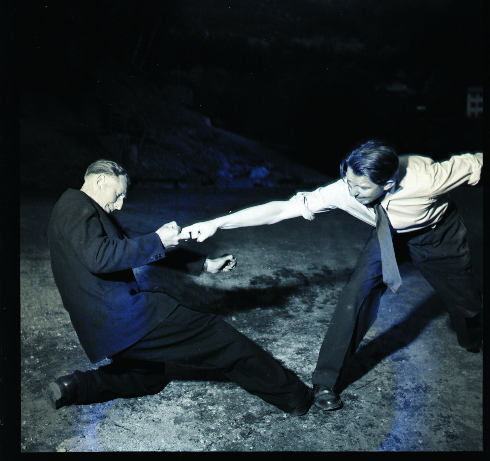 Tradisjonelt bryllup i Ulvik i Hardanger i mai 1954.